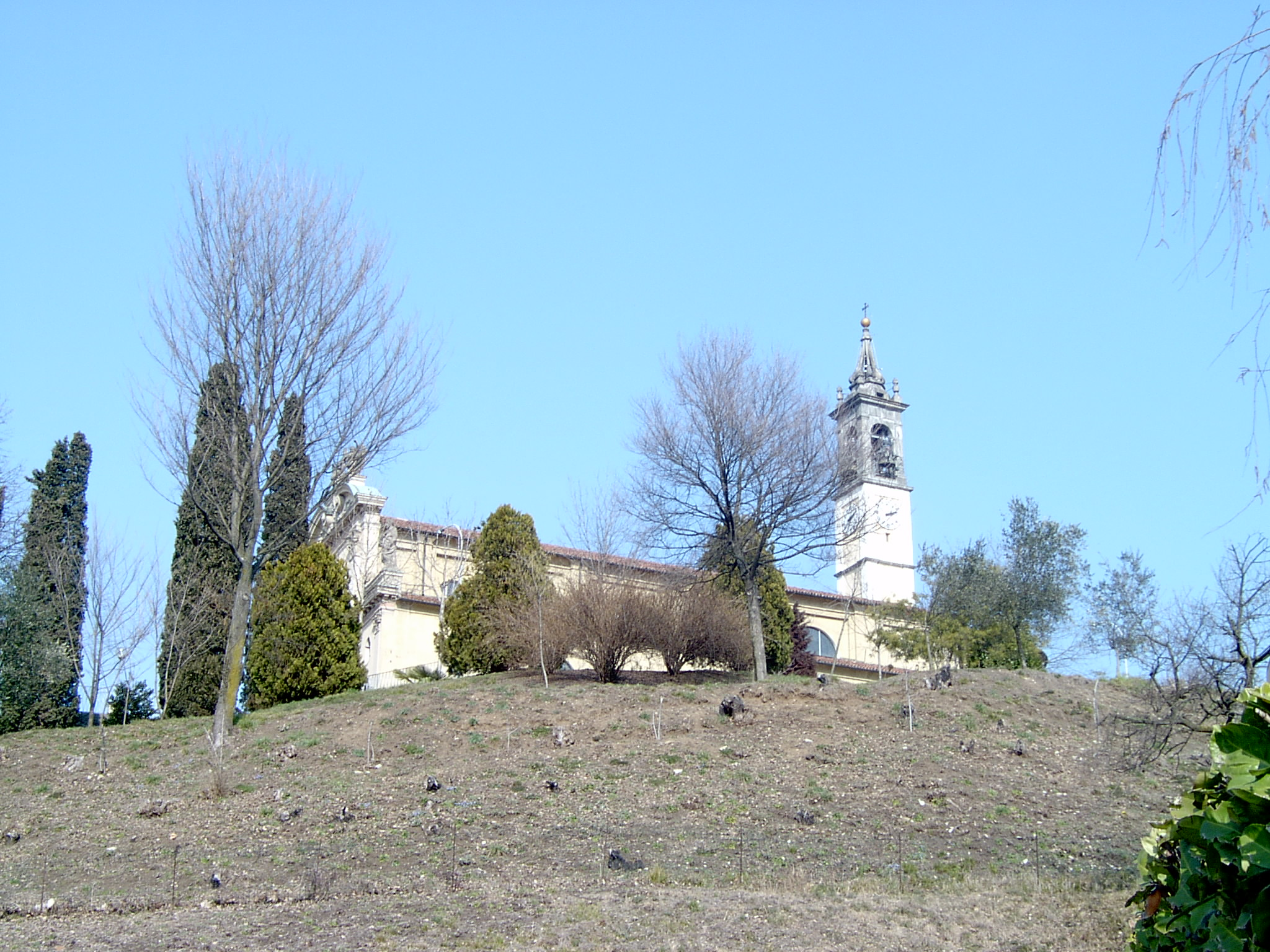 Chiesa Tabiago, Nibionno